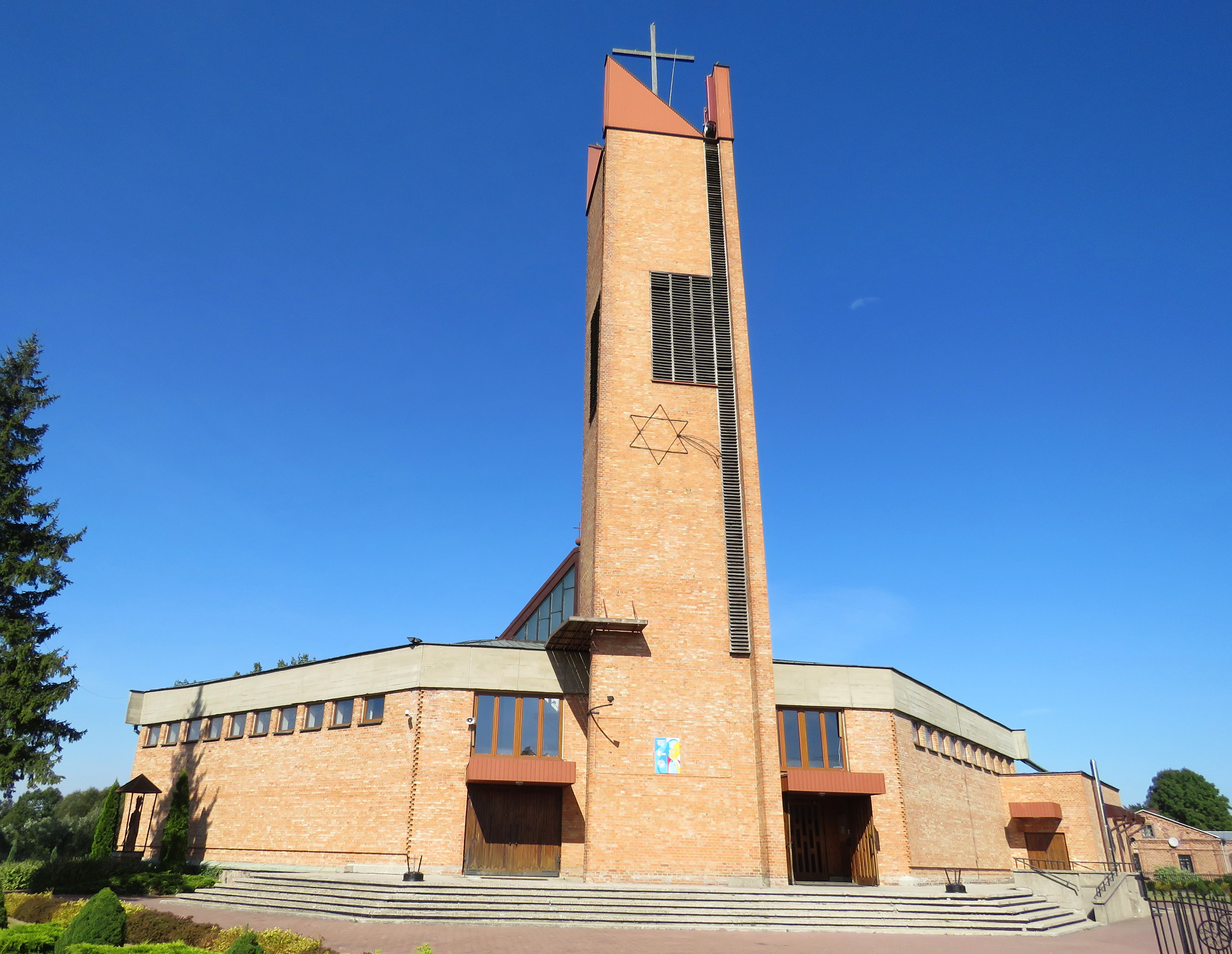 Kościół parafialny p.w. Chrystusa Odkupiciela